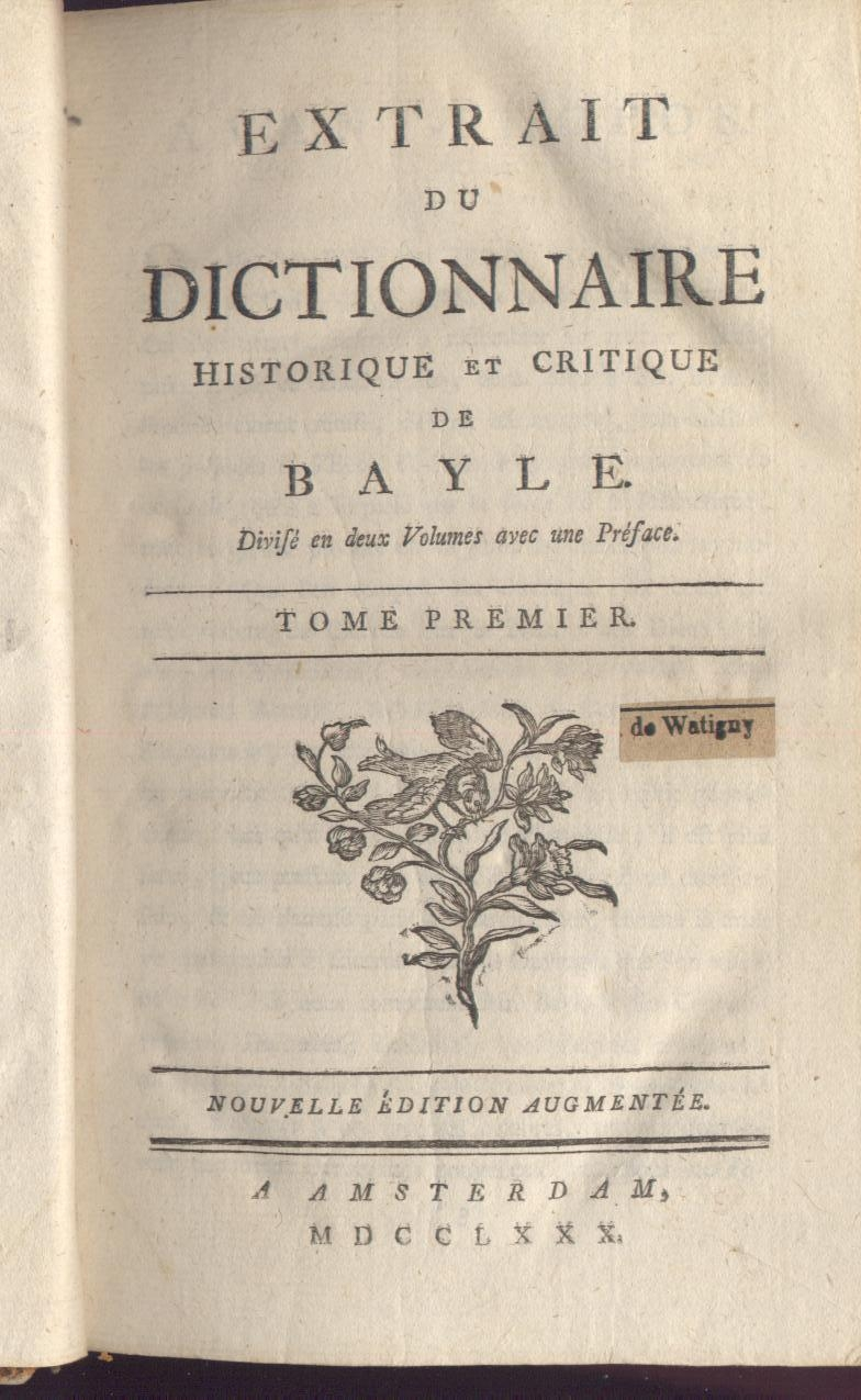 Page de garde d'une édition condensée du dictionnaire de Bayle, XVIIIe siècle.